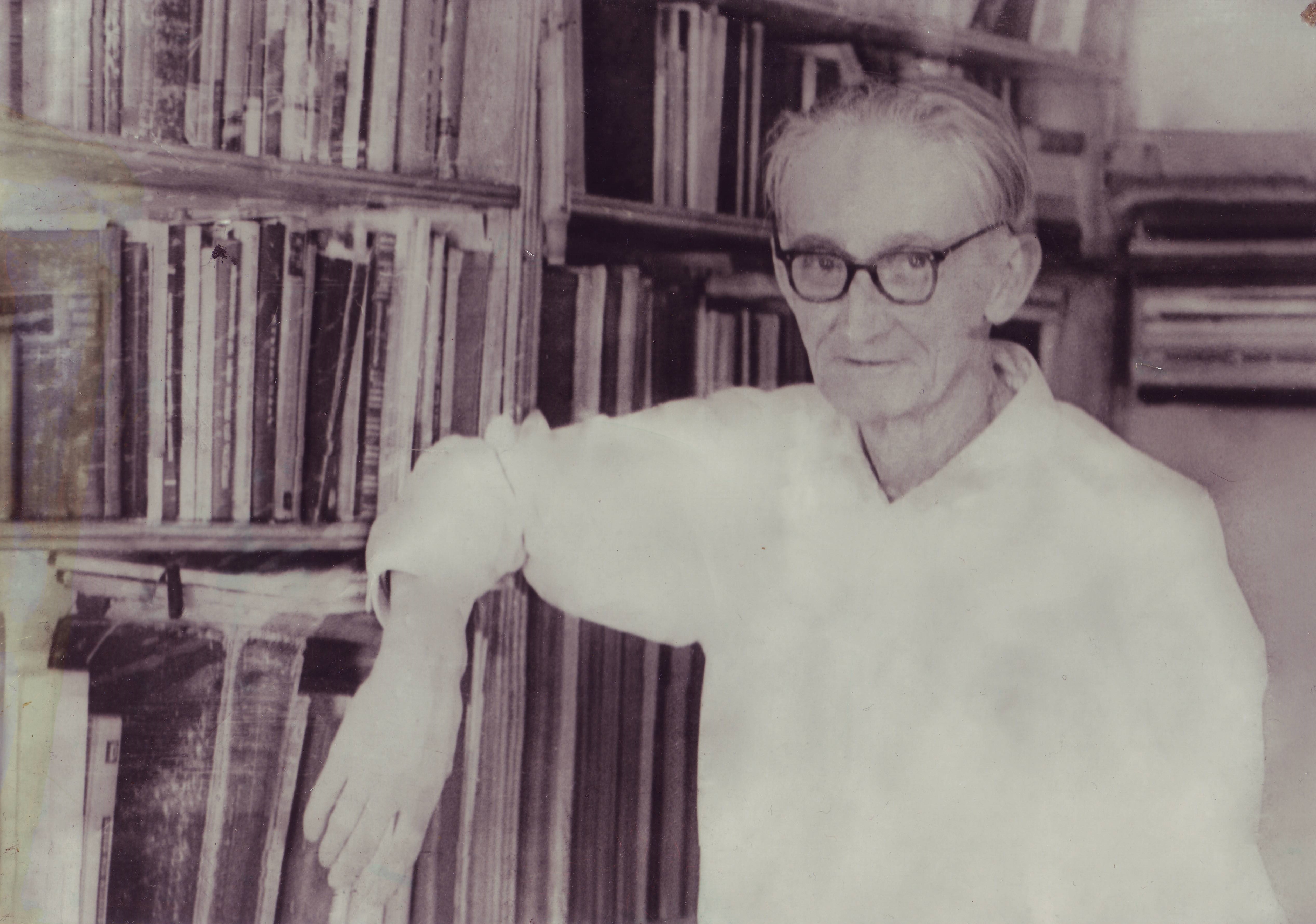 Семичев Борис Владимирович